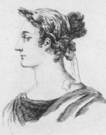 Marquise-Thérèse de Gorla, dite Mlle Du Parc, était une comédienne française, née en 1633 et décédée à Paris le 11 décembre 1668. Elle fit partie de la troupe de Molière de 1653 (lorsque celle-ci circulait encore en province) à 1667, avant de passer à l'Hôtel de Bourgogne où elle créa le rôle titre de la tragédie de Jean Racine Andromaque.